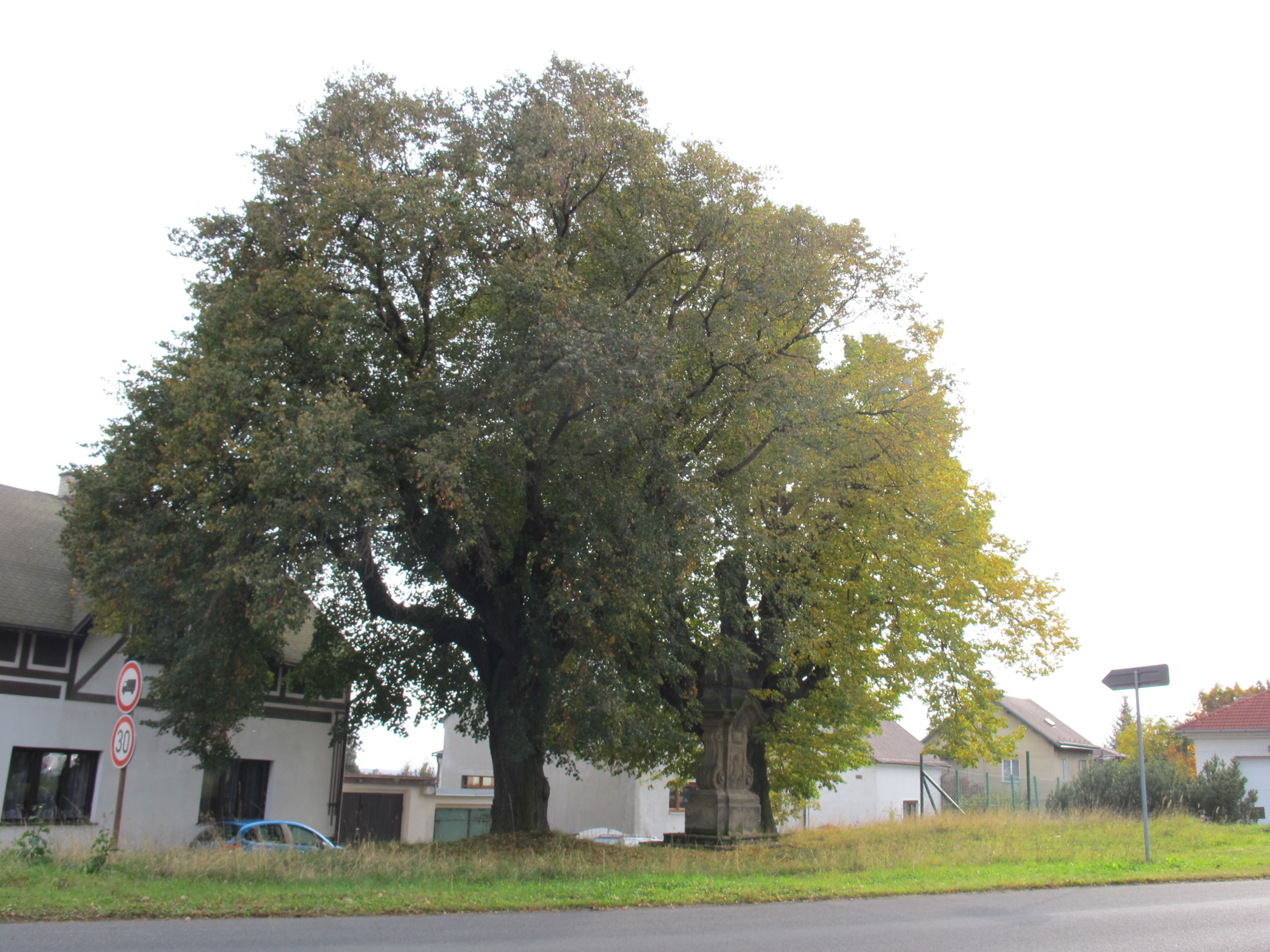 Chráněné lípy a boží muka v Litvínově-Janově